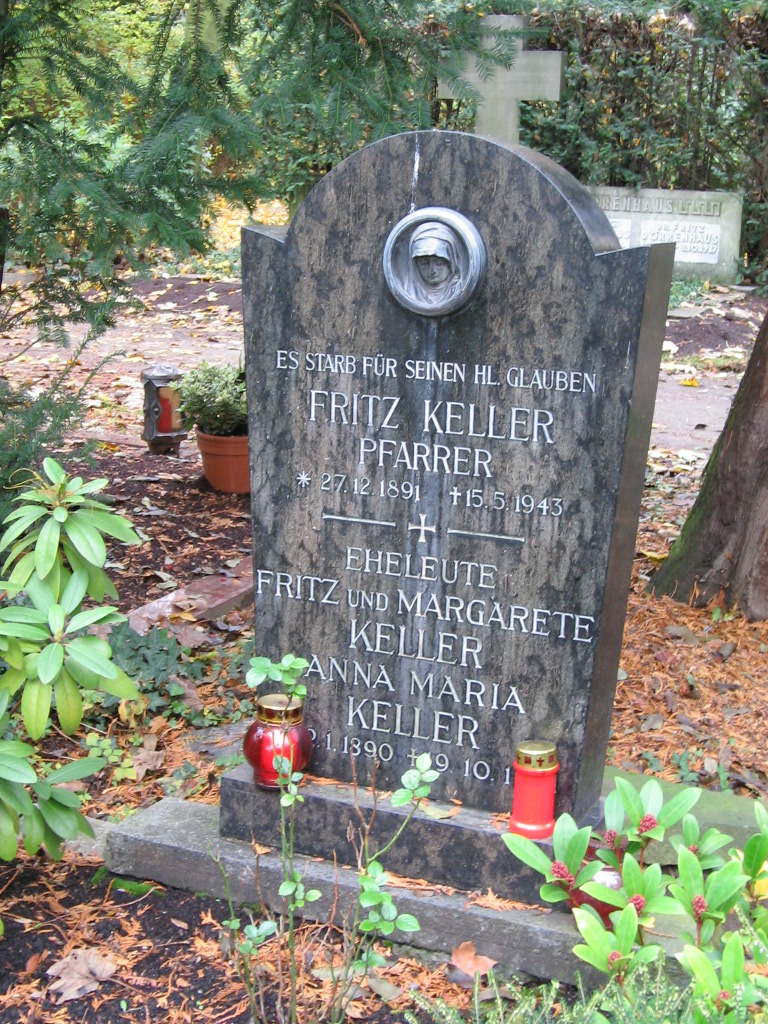 Grabstein für Fritz Keller (Pfarrer und und NS-Opfer) auf dem Melaten-Friedhof in Köln